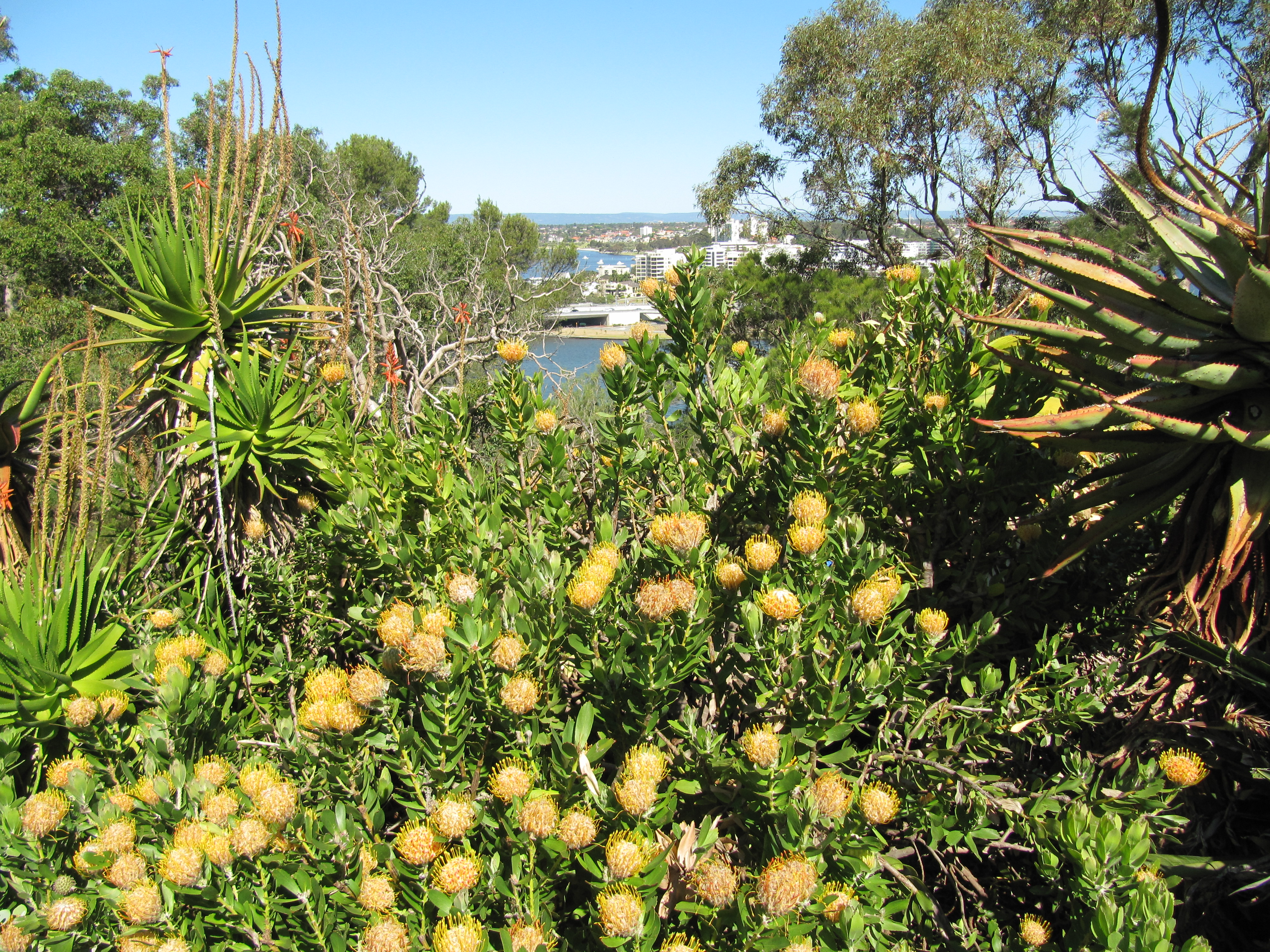 Botanic garden Perth